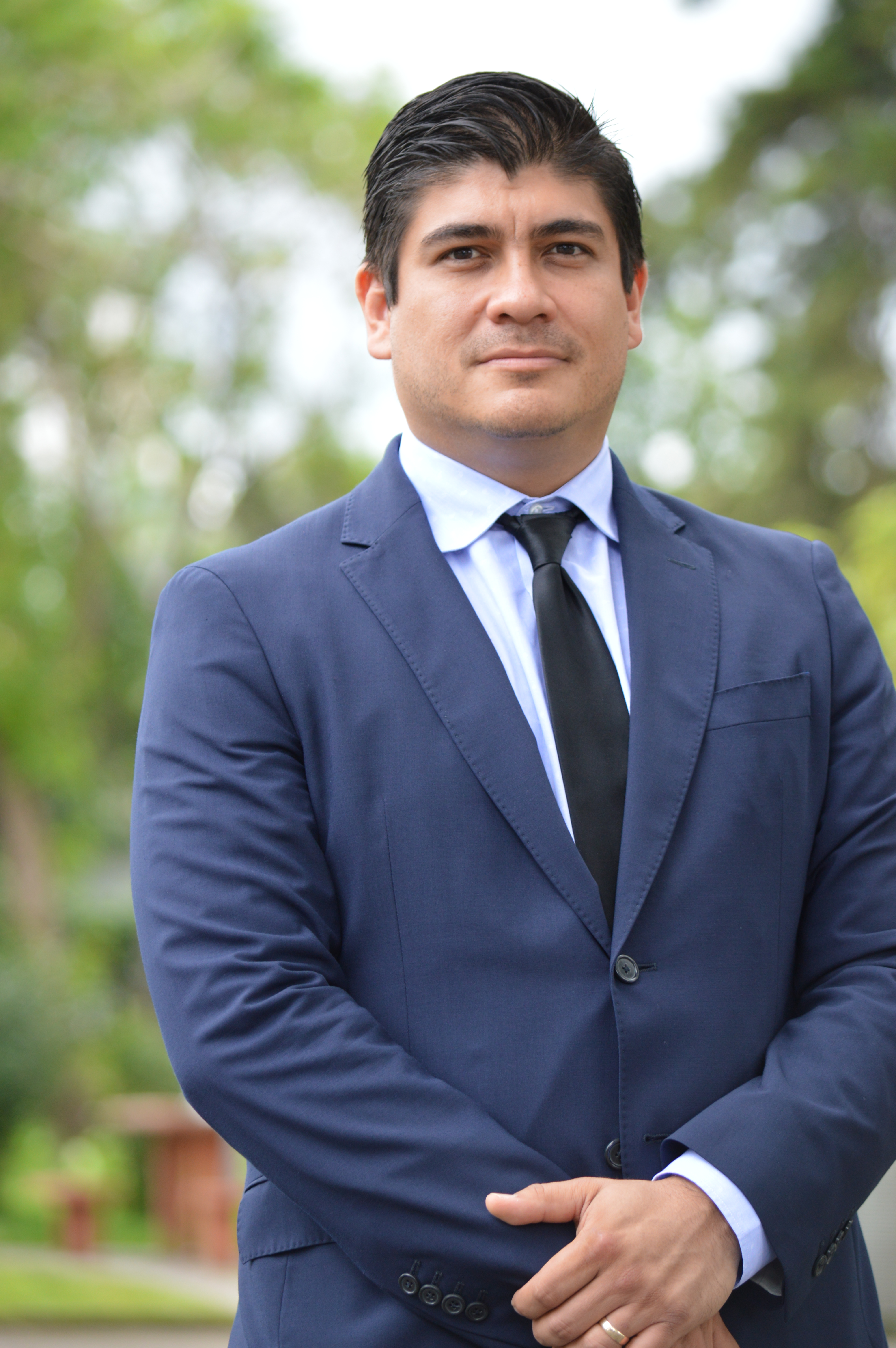 Carlos Alvarado Quesada, precandidato presidencial del Partido Acción Ciudadana.